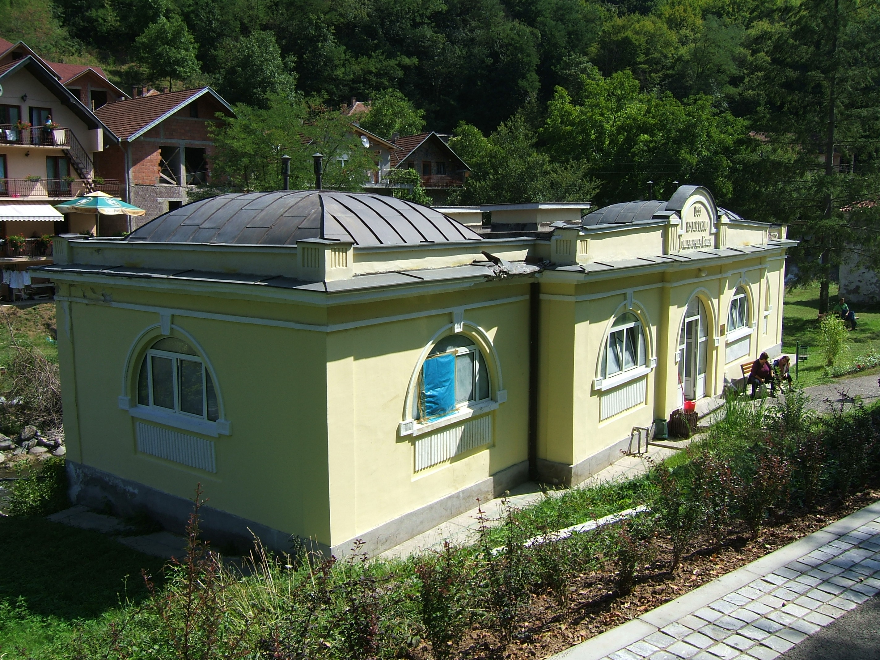 Ново купатило у Јошаничкој Бањи